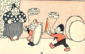 The Katzenjammer Kids panel from 1901.